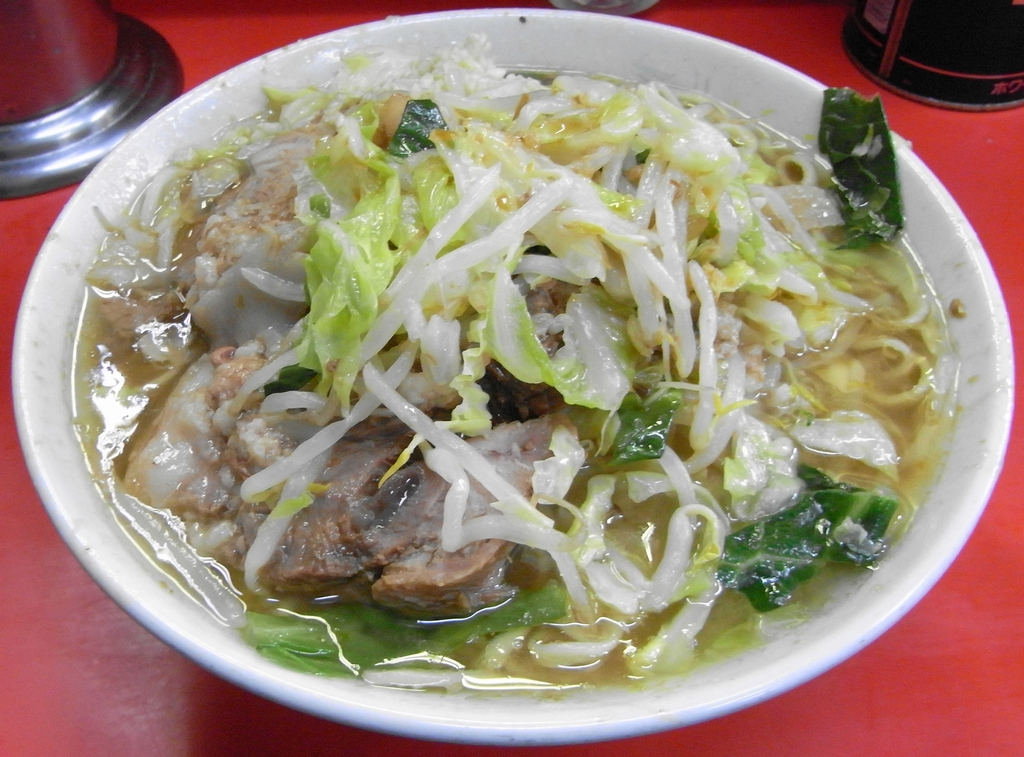 2010年撮影